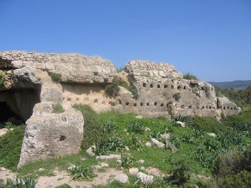 אורוות הסוסים במבצר דטרוא. אסף.צ 14:15, 3 מרץ 2006 (UTC)